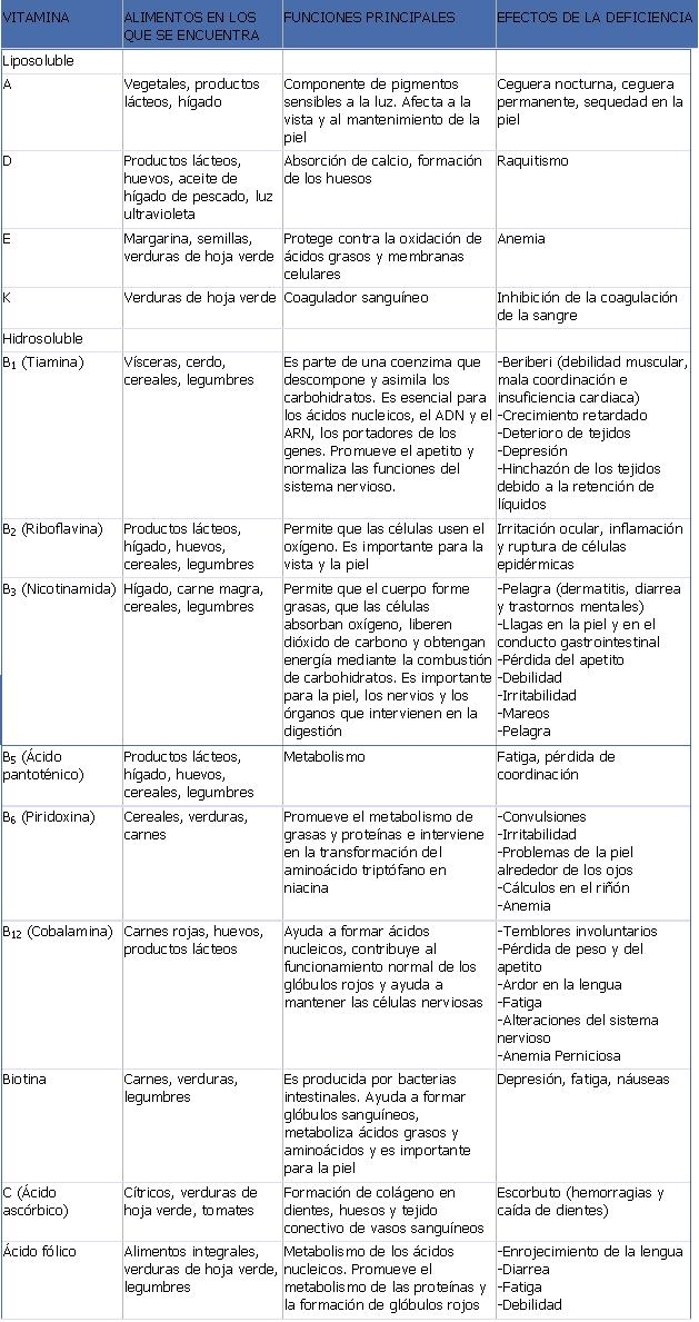 Es una gráfica en la cual se muestran las vitaminas descubiertas por el hombre, su funcion y otros datos importantes de las vitaminas para mas informacion revisar en la pagina